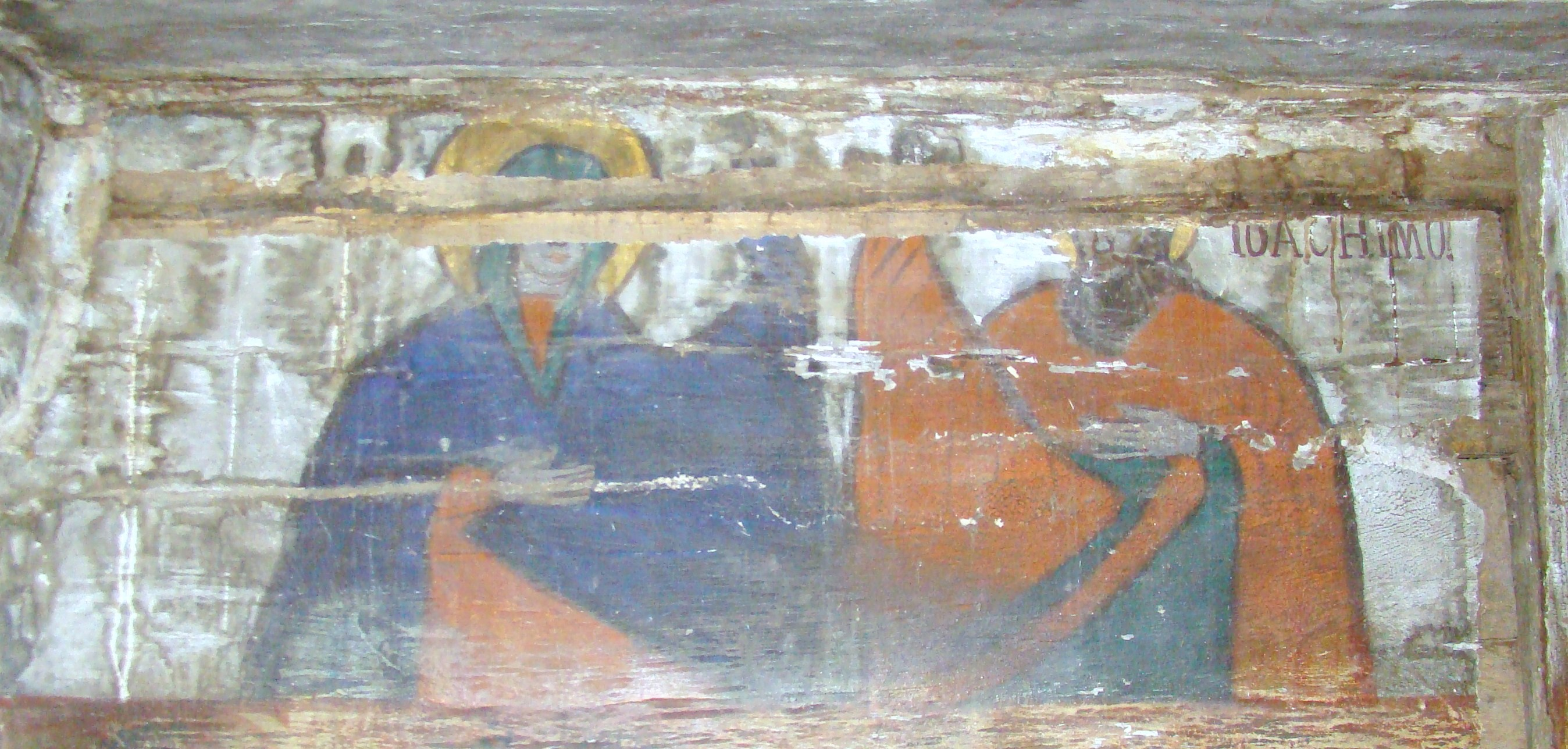 Ana și Ioachim, Biserica de lemn "Sfinții Arhangheli Mihail şi Gavriil, sat CALNA; comuna VAD, județul Cluj